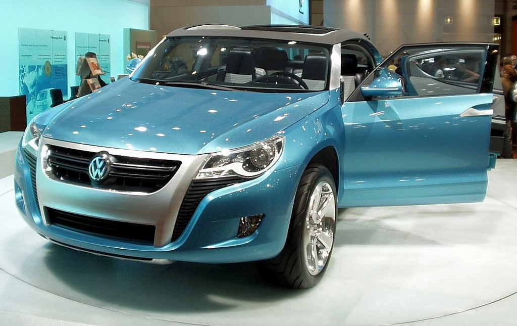 VW Concept A